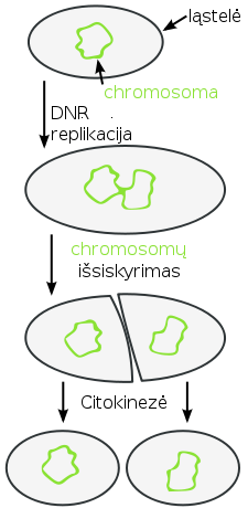 Bakterijos dalijimasis pusiau